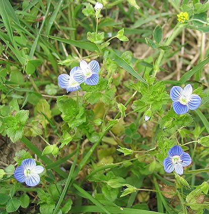 Veronica persica (véronique de Perse). Photo prise en mai 2004 à Ille-sur-Têt. GFDL Jean Tosti 10/2004